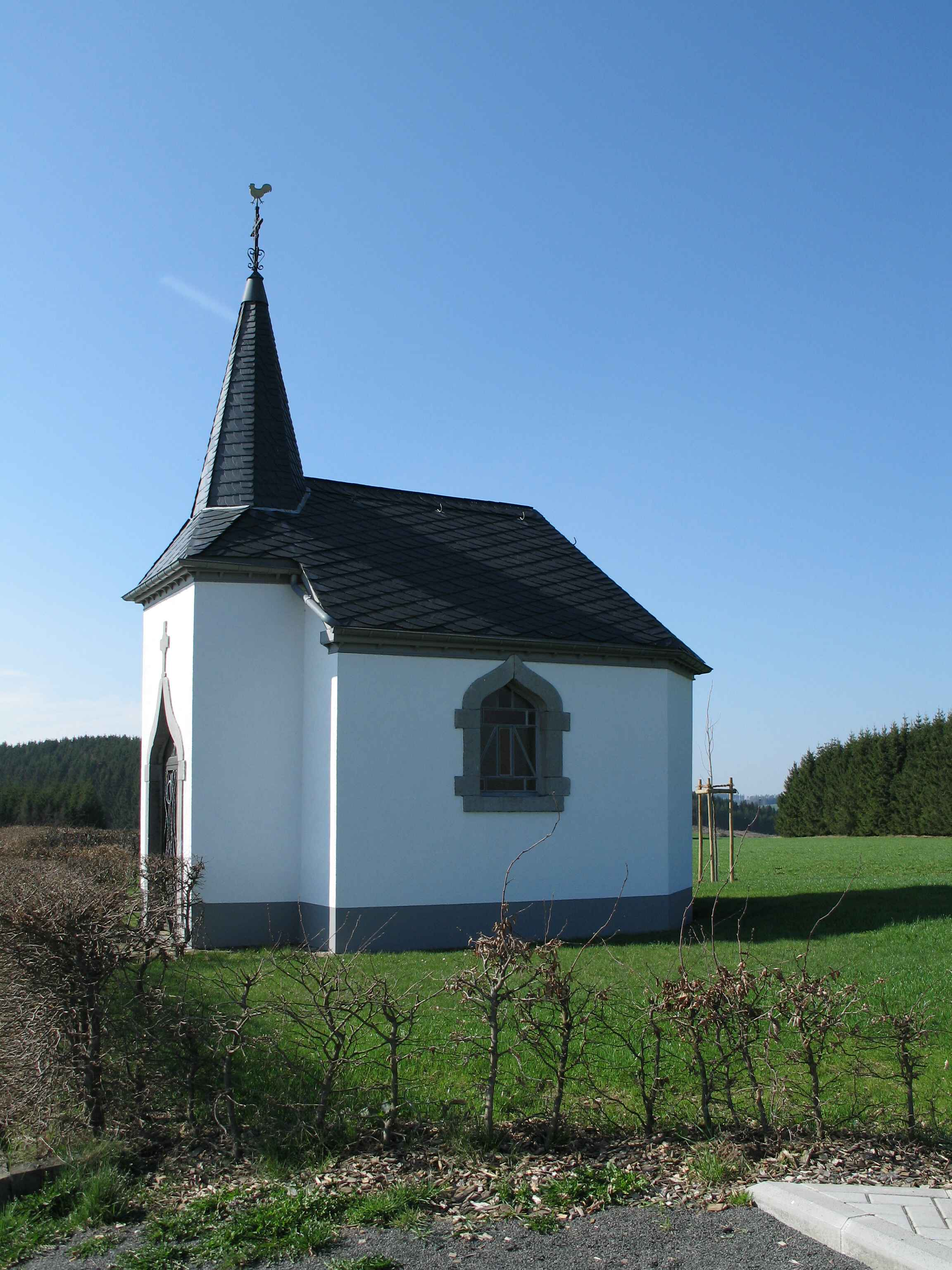 Kapell beim Lancaster Memorial.